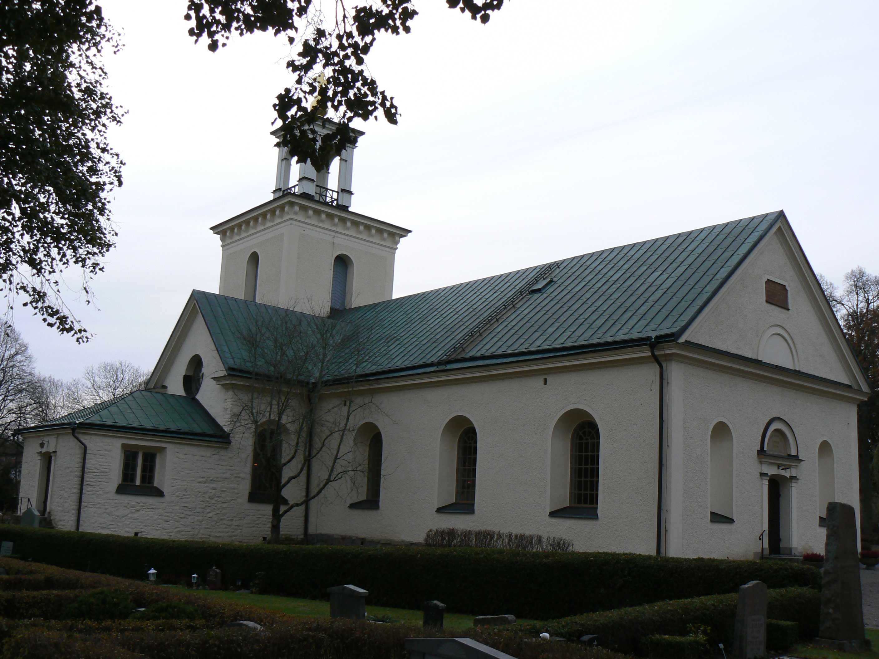 Kärna church in Malmslätt outside Linköping in Sweden. Photo by Skvattram 2006-11-10